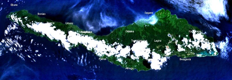 Photo satellite de Misima , île volcanique des Louisiades , dans la province de Milne Bay , en Papouasie-Nouvelle-Guinée .